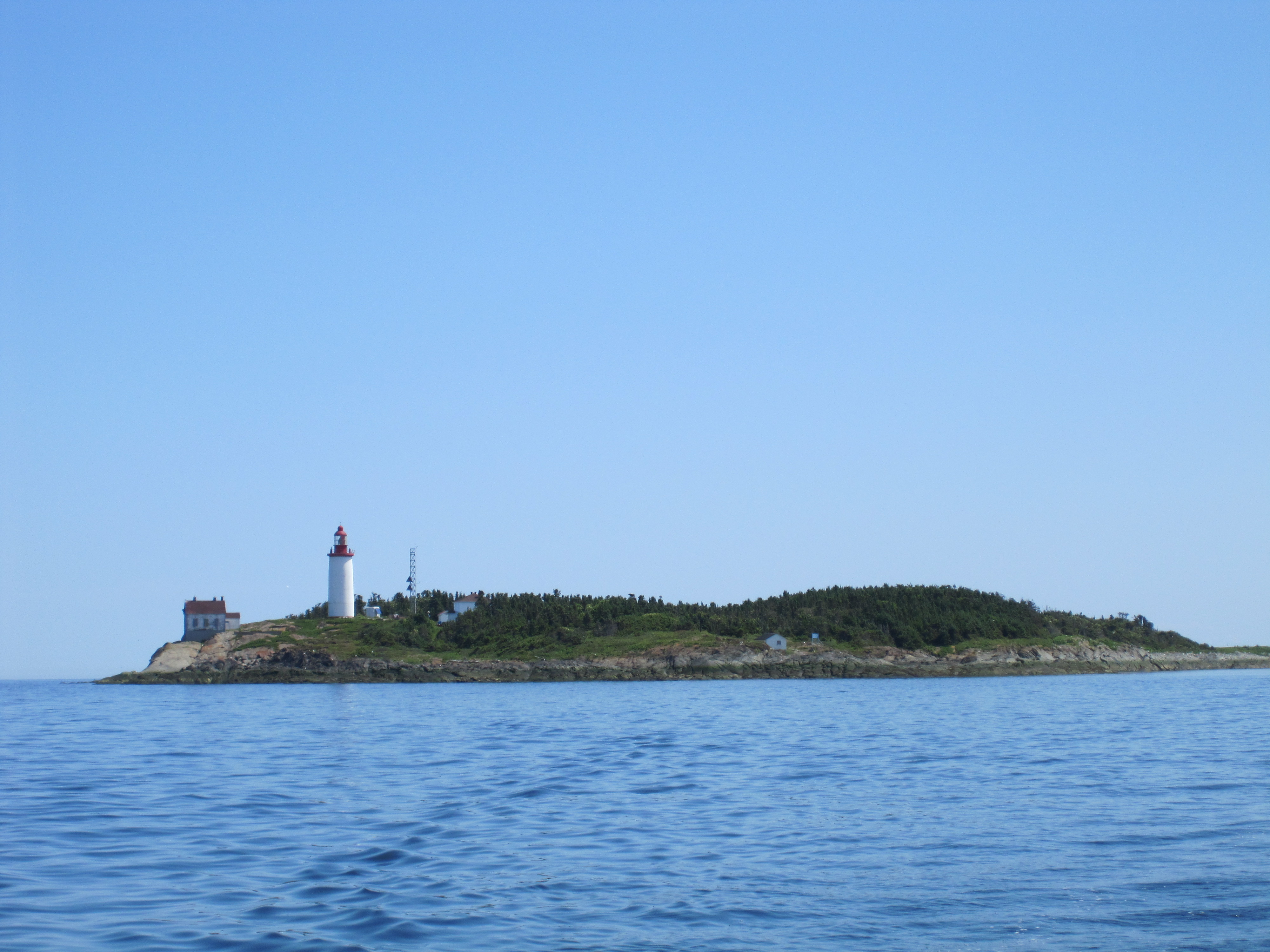 L'Île Bicquette (Québec) et son phare